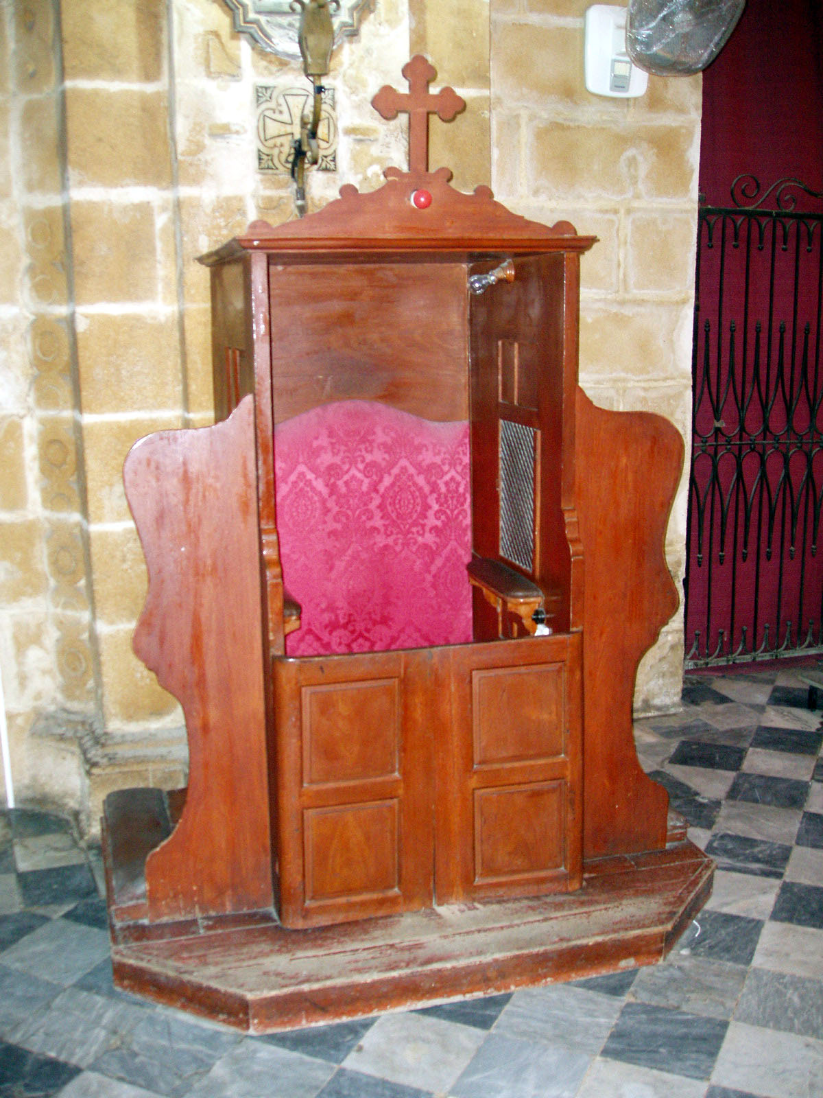 Confesionario.